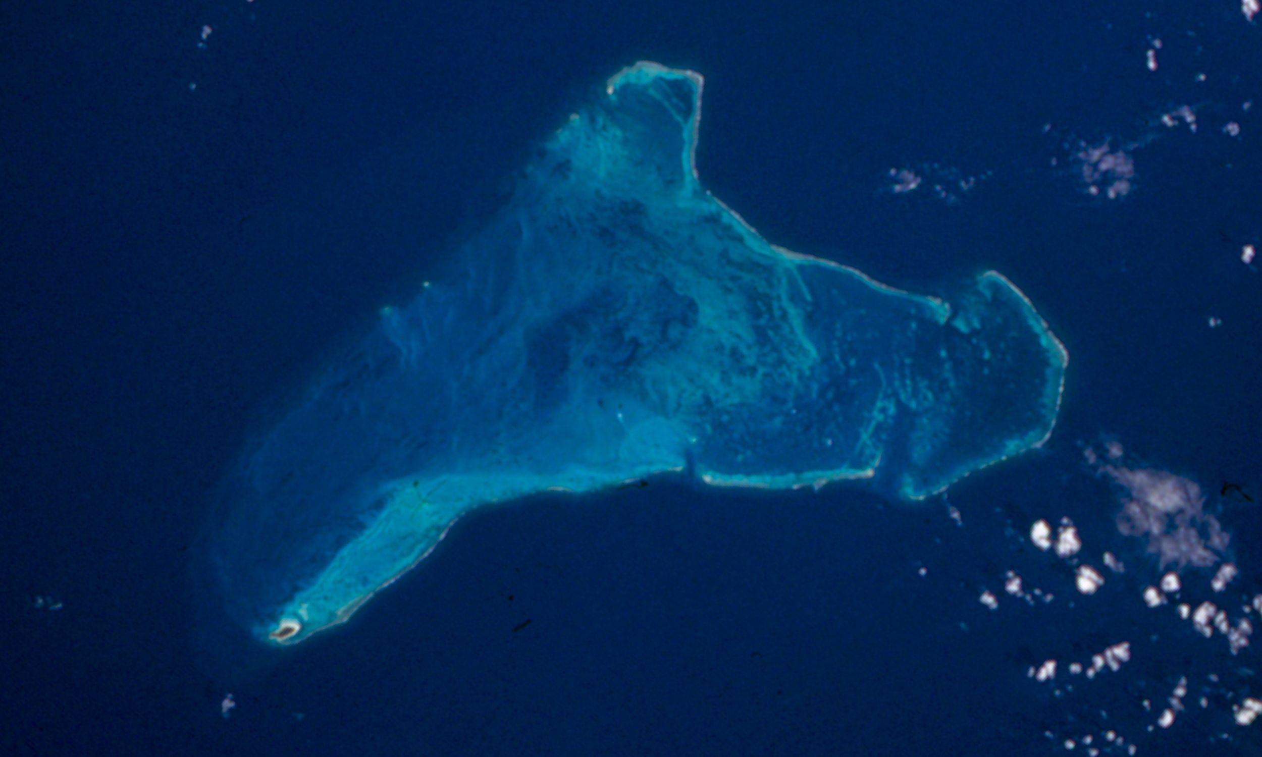 Serrana Bank, banco donde el náufrago Pedro Serrano estuvo 8 años aislado, situado en latitud 14º 20' N y longitud 80º 25' O, a 220 millas náuticas de la costa de Nicaragua